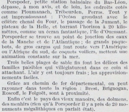 Article de la "Revue du Touring-Club de France", n° d'octobre 1925, vantant les attraits touristiques de Porspoder?